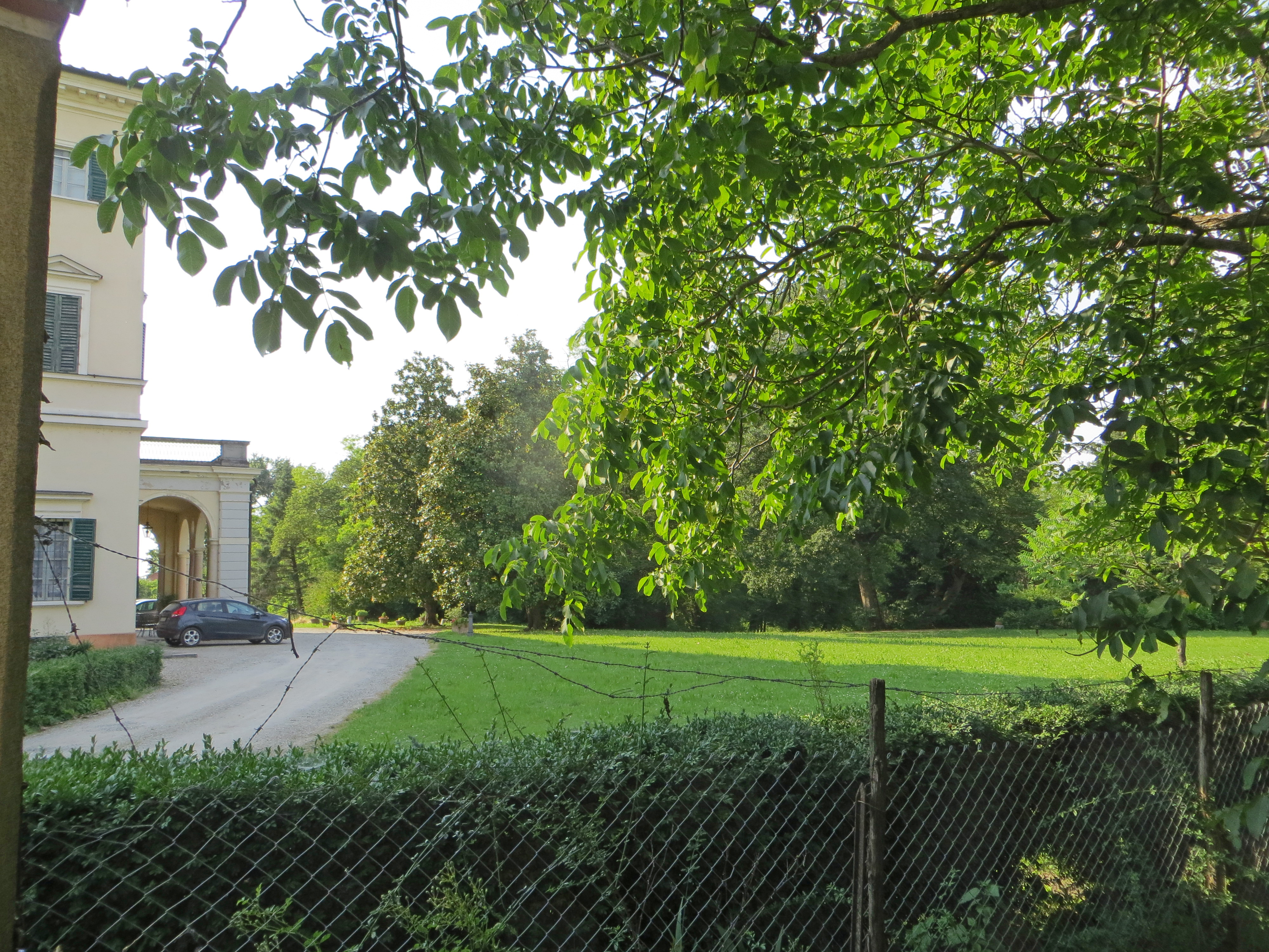 Villa Paganini (Gaione, Parma) - parco